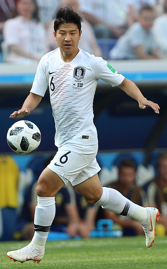 Швеция победила Южную Корею в матче ЧМ-2018